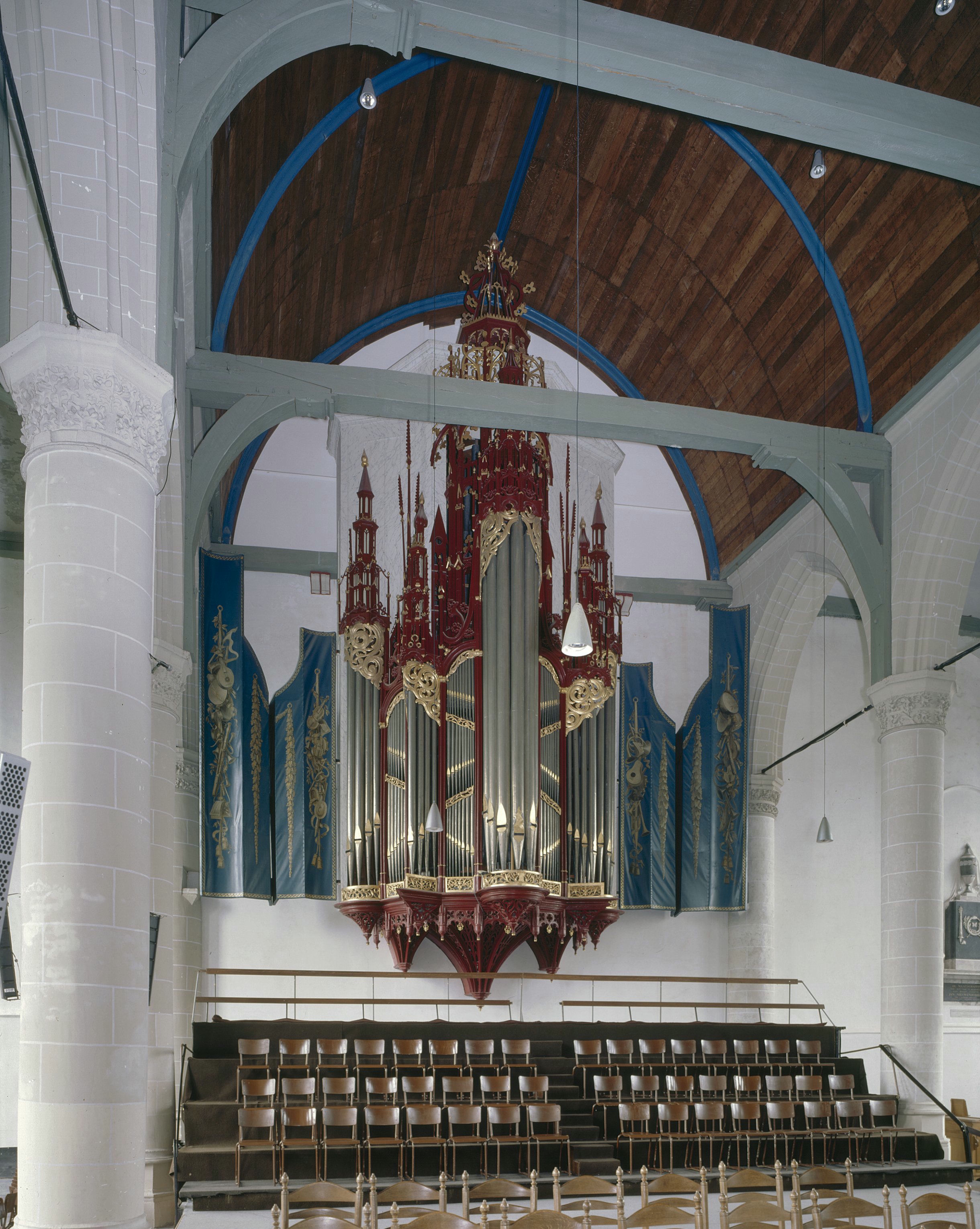 Sint-Nicolaaskerk: Interieur, aanzicht orgel, orgelnummer 998 (opmerking: Gefotografeerd voor Het Historische Orgel in Nederland 1769-1790)